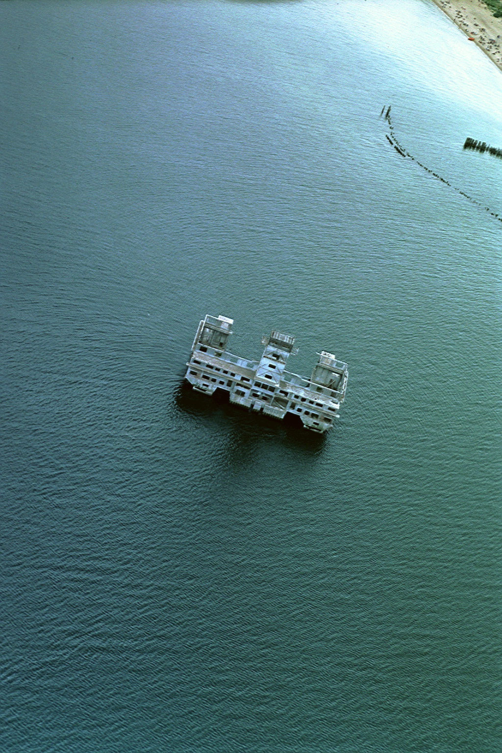 Gdynia. Torpedownia.